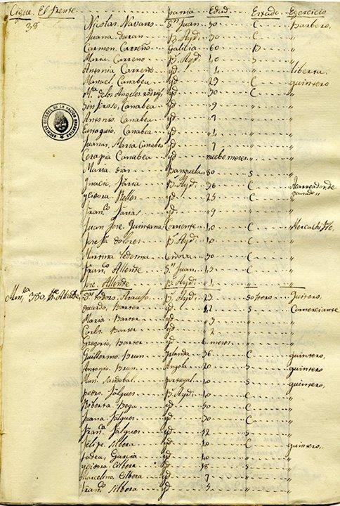 AGN Sala IX. Legajo 10.7.2